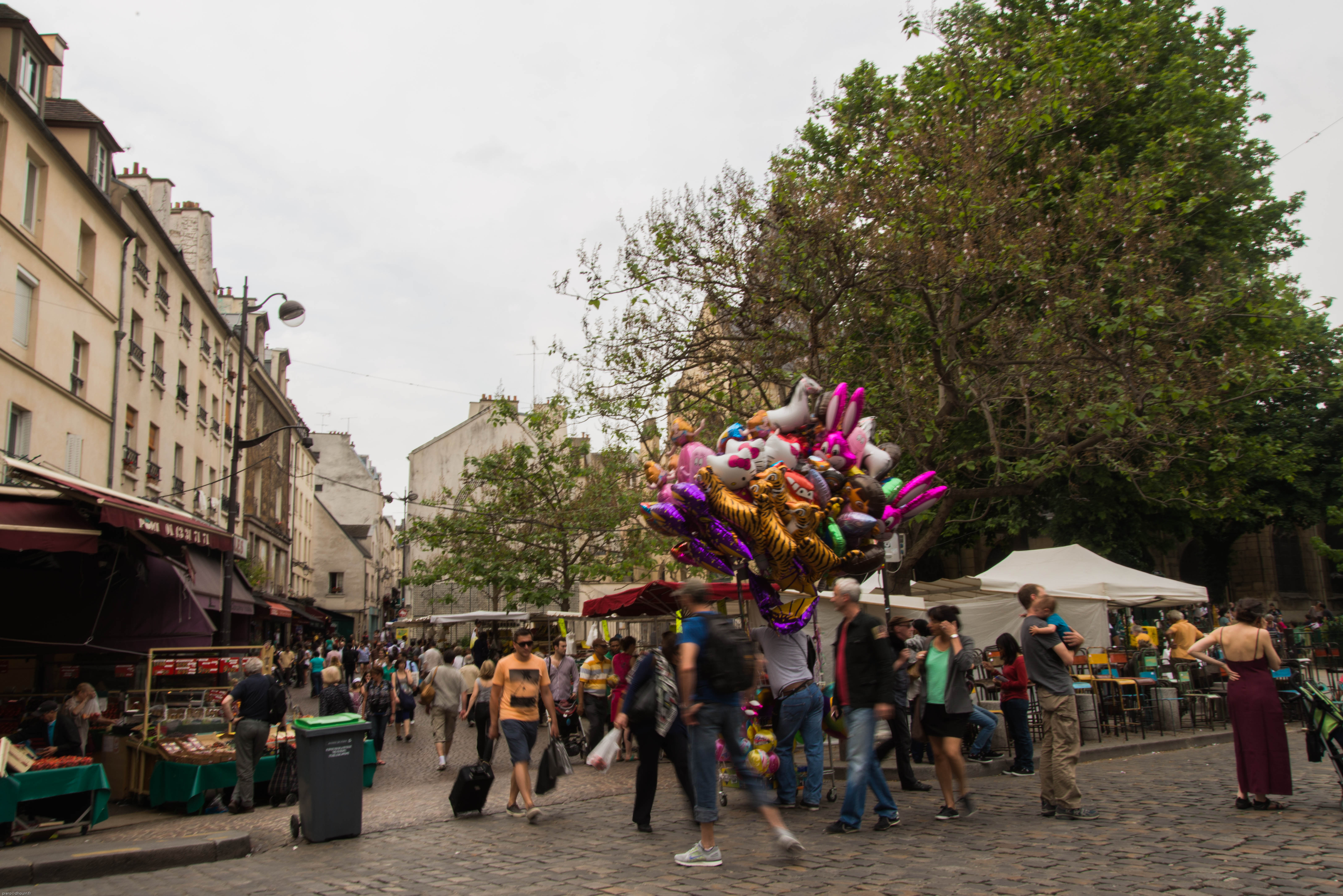 Le bas de la rue Mouffetard à Paris (France)